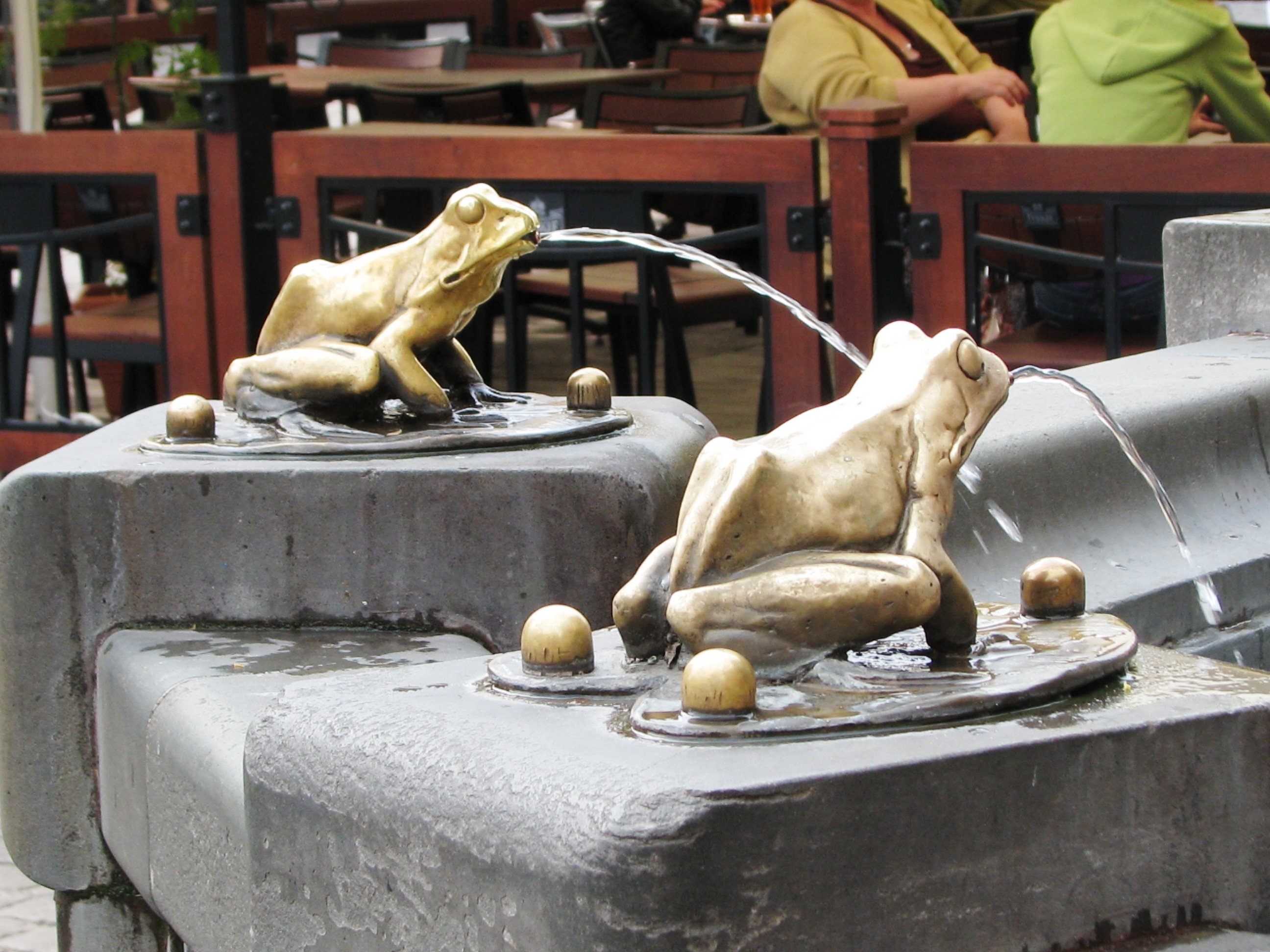 Żaby z pomnika flisaka na Rynku Staromiejskim w Toruniu